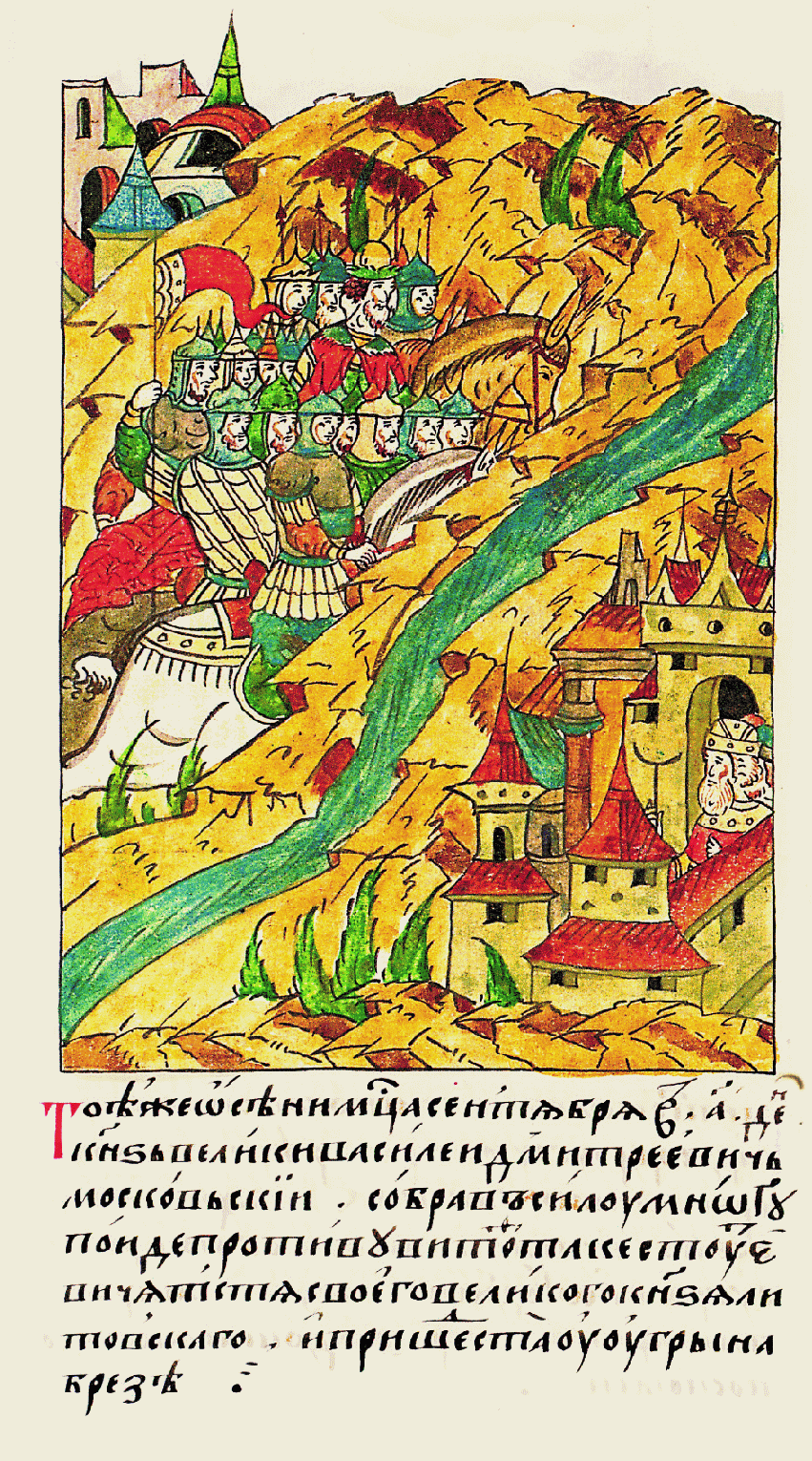 В ту же осень месяца сентября в 1 день великий князь Василий Дми- триевич Московский, собрав большое во- йско, выступил против своего тестя велико- го князя Литовского Витовта Кейстутовича и встал на берегу Угры